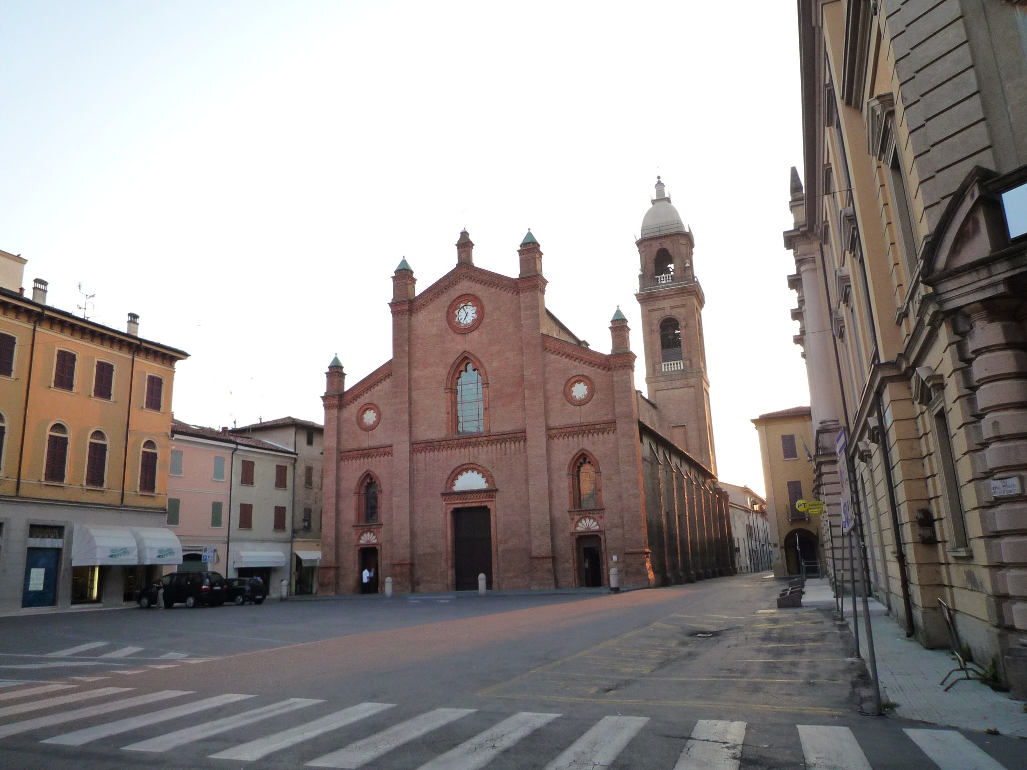 Mirandola: chiesa parrocchiale di Santa Maria Maggiore.